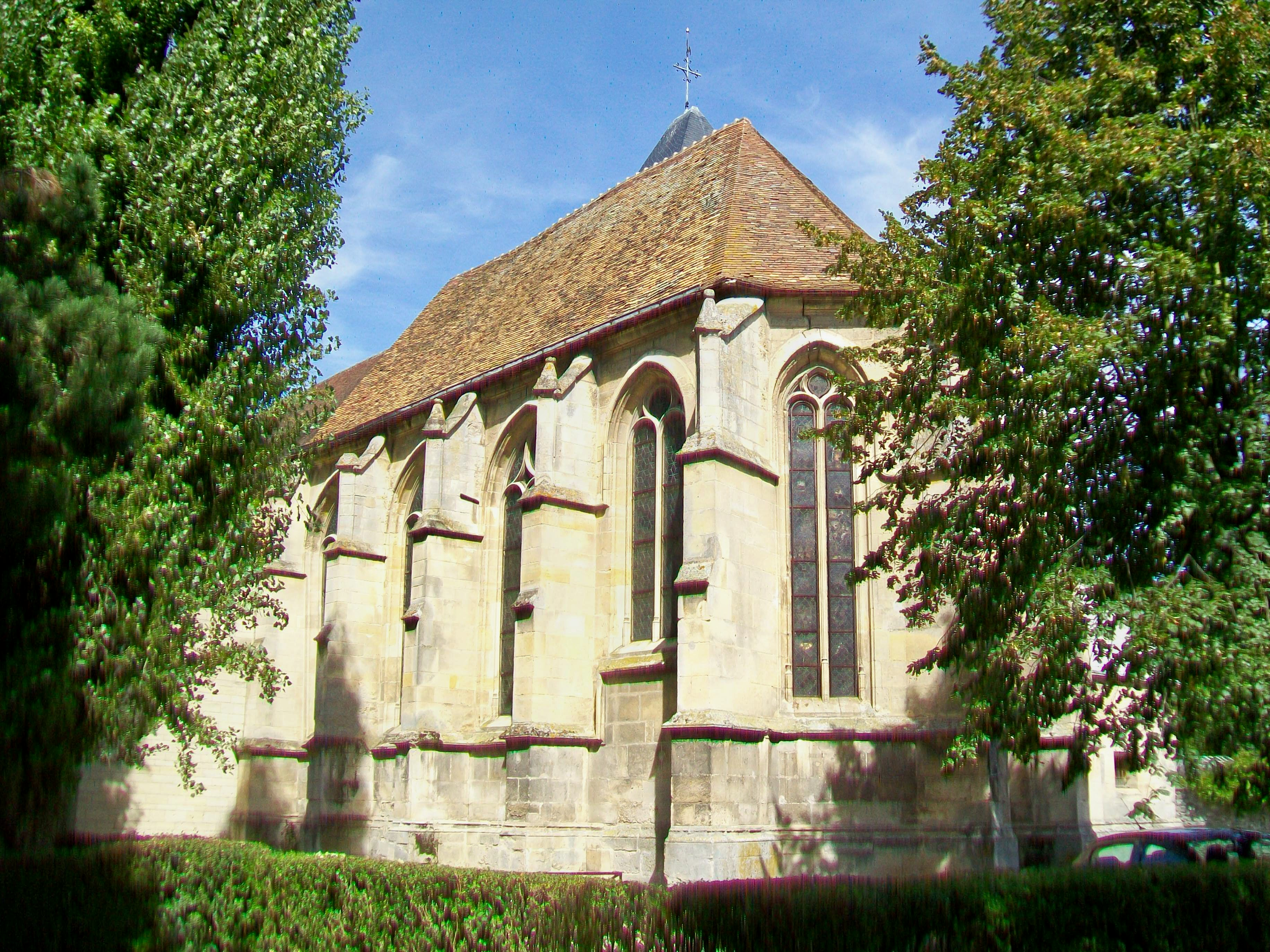 La façade sud-ouest. La partie de l'église visible sur la photo représente la totalité de l'édifice classé, la nef de la seconde moitié des années 1960, le clocher et le bas-côté nord n'étant pas inclus.